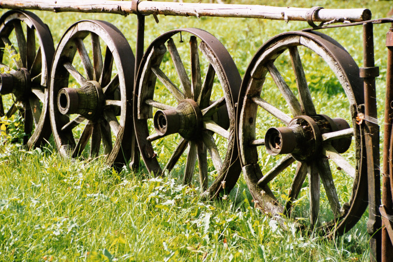 Wagenräder